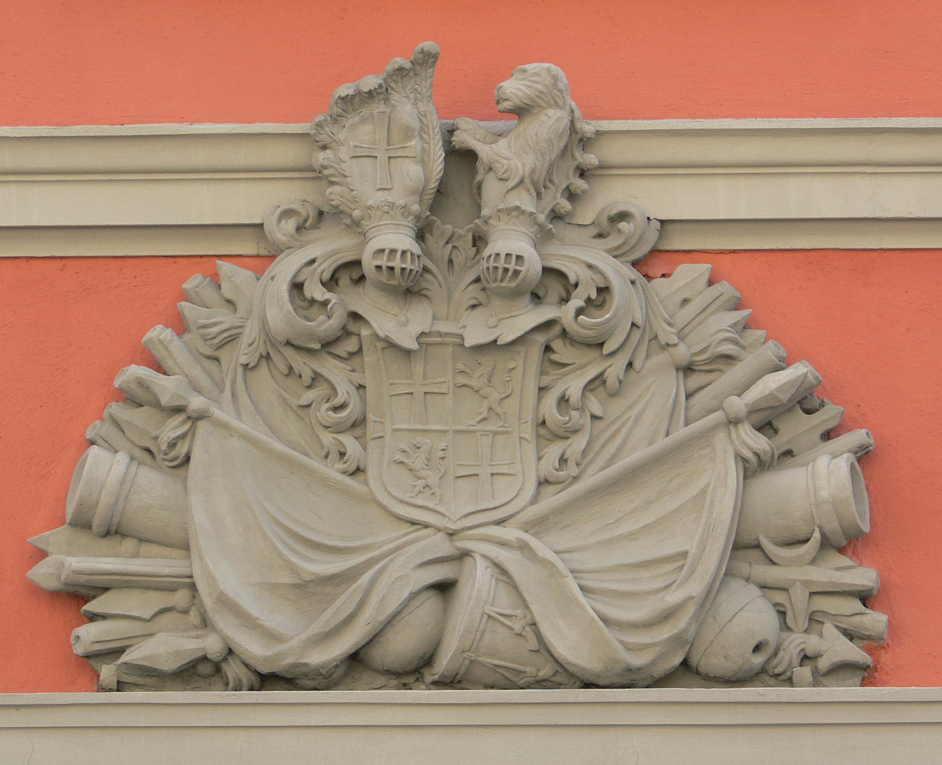 Ravensburg, Altshauser Hof (erbaut als Haus der Deutschordenskommende Altshausen), Wappen des Franz Ignatius Anton Freiherr von Reinach (Landkomtur 1730-1735) über dem Eingang